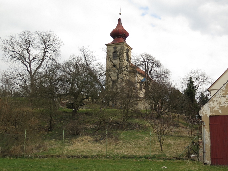 Kostel svatých Petra a Pavla, Soběnice.